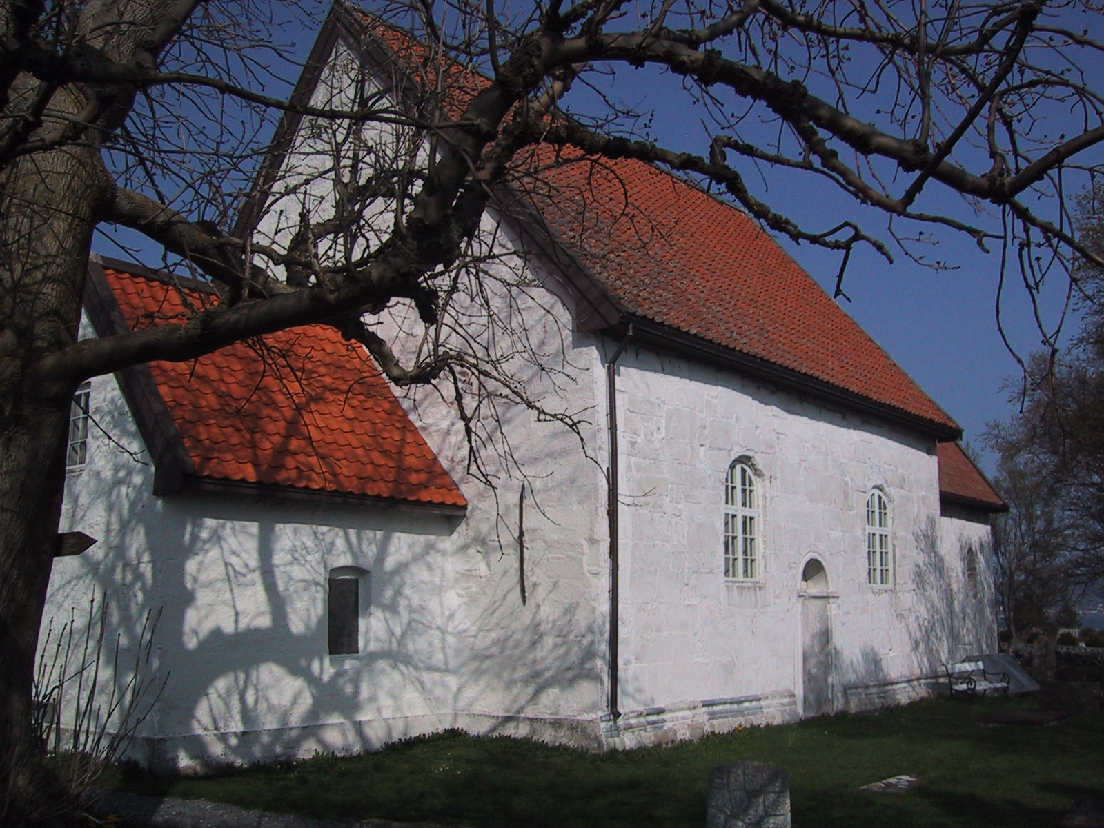 Giske kyrkje sett frå sørvest